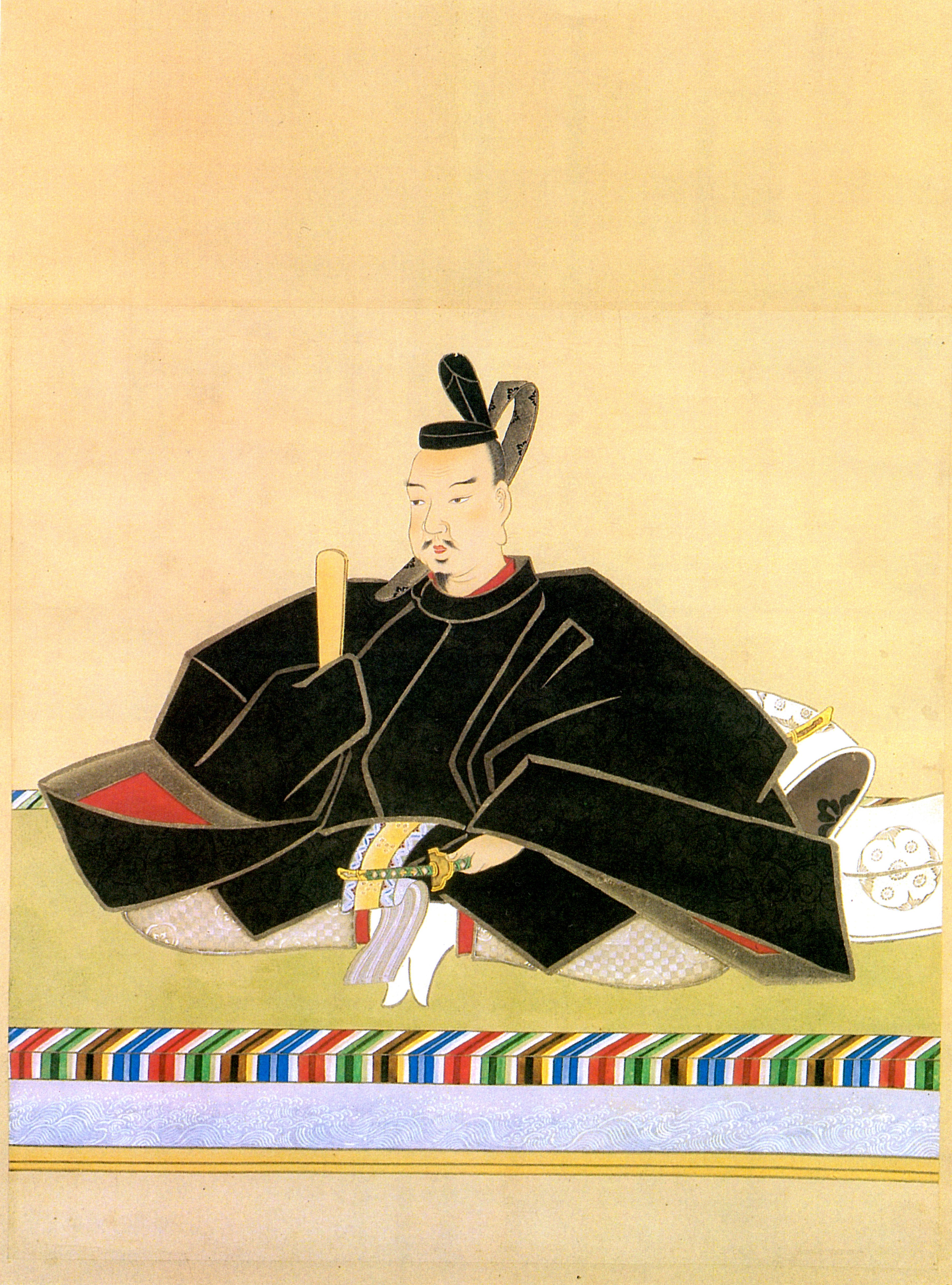 相馬昌胤の肖像。